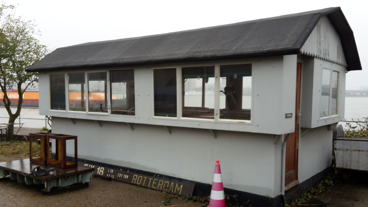 Het door studio Sandy Warnaar gerestaureerde laatste walhuisje van de haven van Rotterdam (mogelijk een oude kajuit die in gebruik was als kantoor te Delfshaven bij Motordienst Fix Rotterdam). Tijdelijk opgeslagen op het terrein van de voormalige carbidopslag van de RDM, dat na de vervanging van carbid door flessen met acethyleengas om te lassen dienst deed als kantoor en als laatste bekend stond als metselaarshok welke naam momenteel ook op het pand en de bewegwijzering staat.